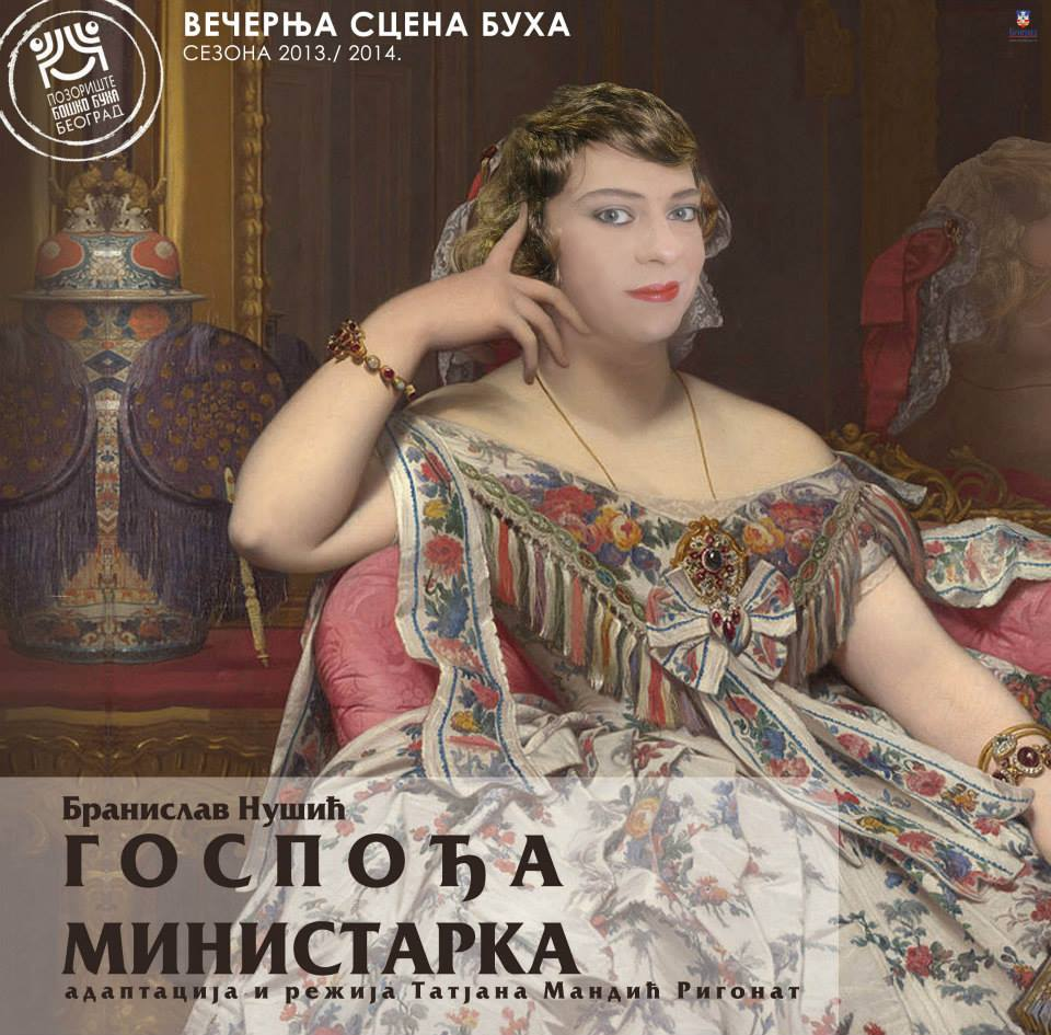 Српски (ћирилица): Плакат за премијеру представе "Госпођа Министарка" у извођењу ансамбла позоришта Бошко Буха.